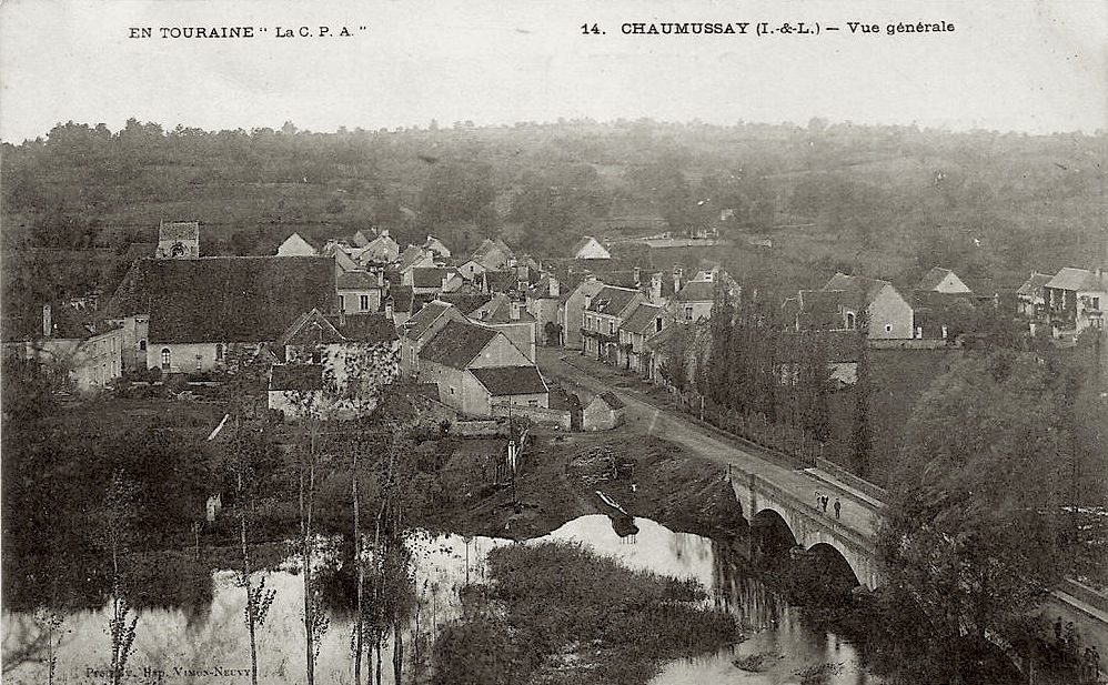 Vue générale du bourg de Chaumussay, pont traversant la Claise et église St Médard